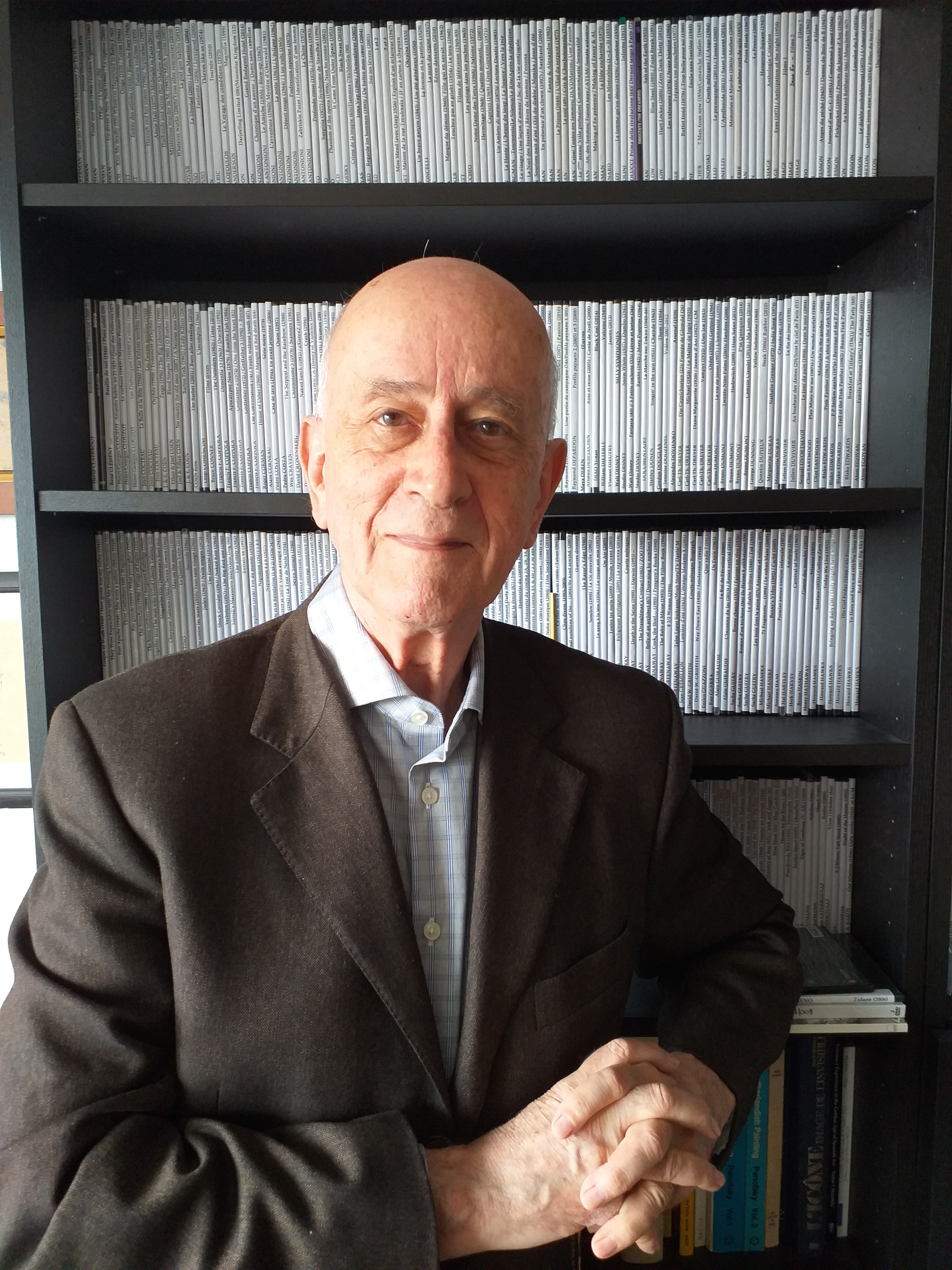 Portrait de Jacques Aumont